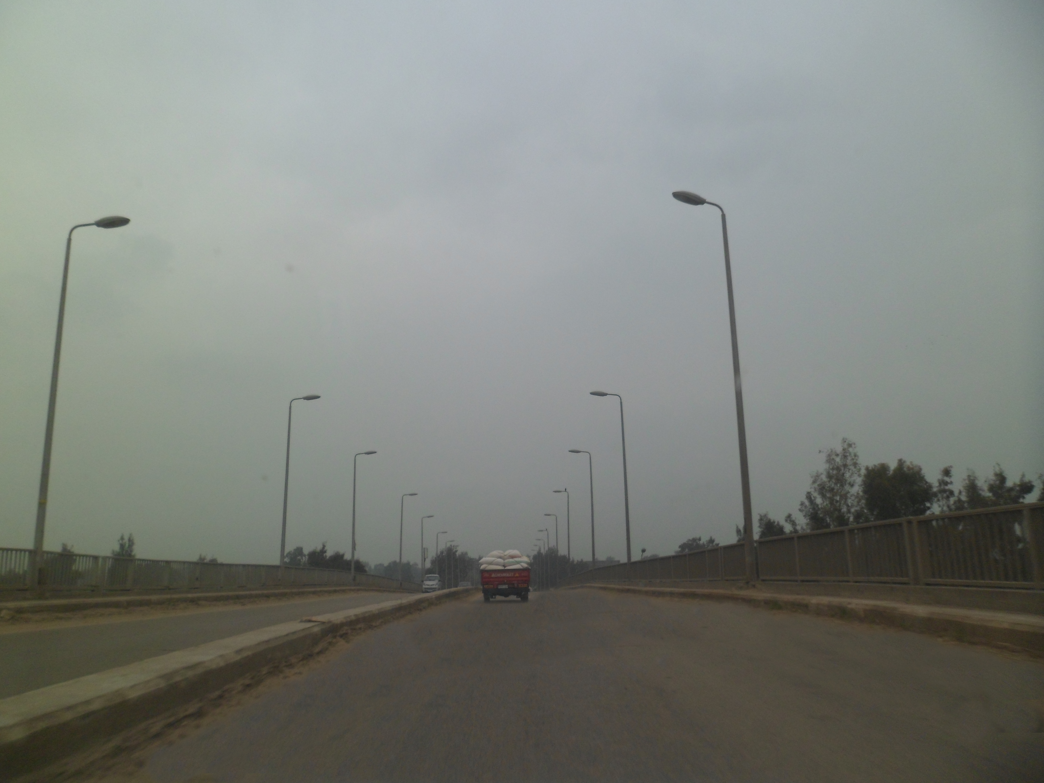 كوبري البدالة العلوي، دسوق